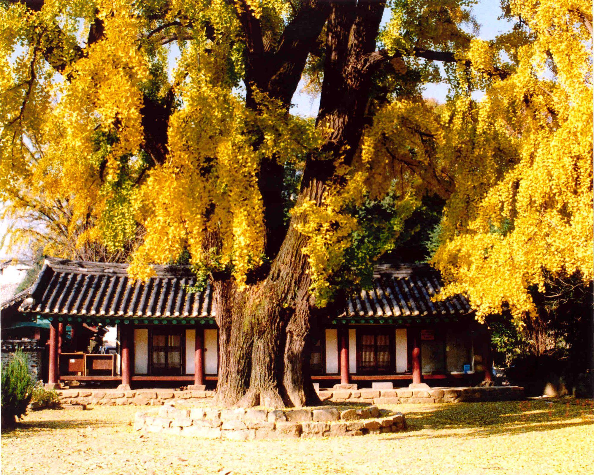 Ginkgobaum aufgenommen in Hyanggyo